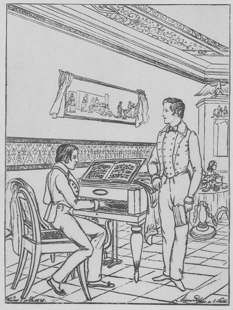 Zeichnung: die drei Enkelkinder Goethes im Junozimmer des Goethehauses. Walther am Streicher-Flügel sitzend, Wolfgang rechts neben ihm stehend und die jüngere Schwester Alma rechts im Hintergrund hinter dem runden Tisch spielend (nur Oberkörper sichtbar). Im Bild datiert "Weimar d[en] 11. Dec[ember] 1836." und signiert: "v. Arnswald fec[it] n[ach] d[er] Natur." (d. i. Bernhard von Arnswald (1807-1877))